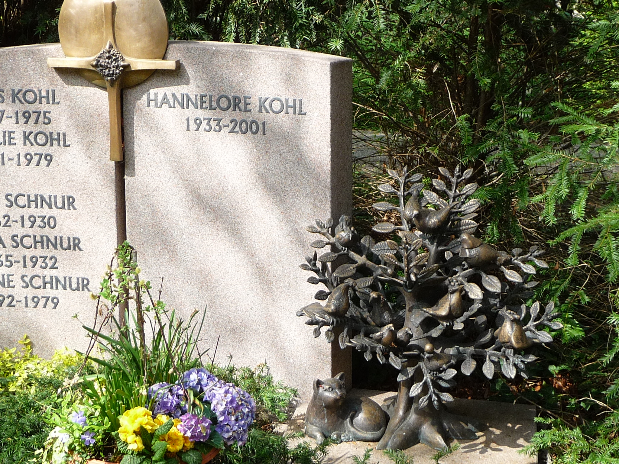 Friedhof in Ludwigshafen-Friesenheim